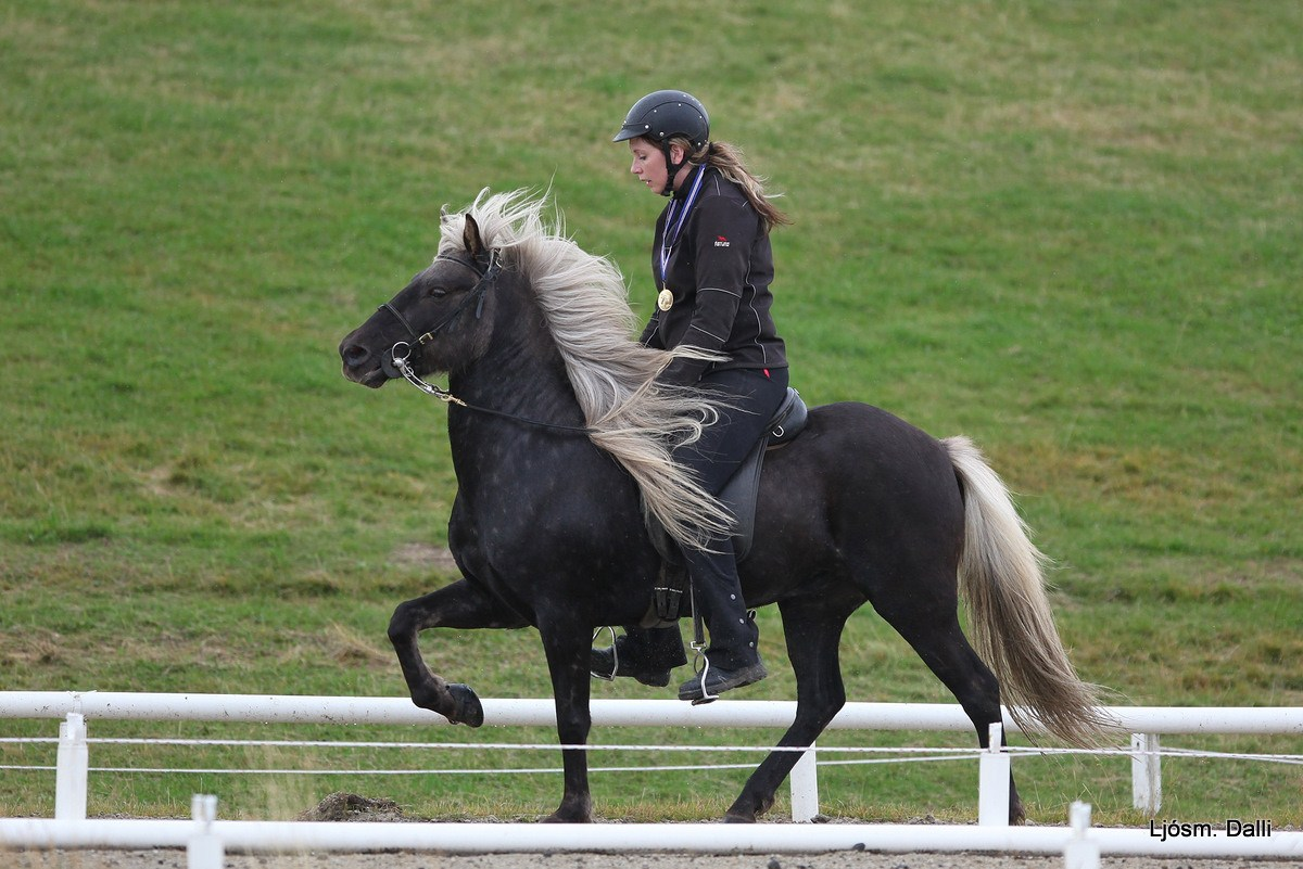 Móey Álfhólum Sara Ástþórsdóttir